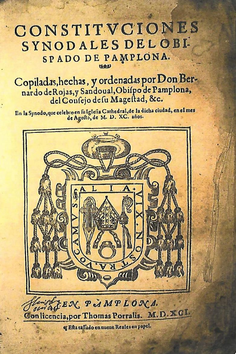 Tomás Porralis, Constituciones Sinodales Sandoval, 1591. Pamplona